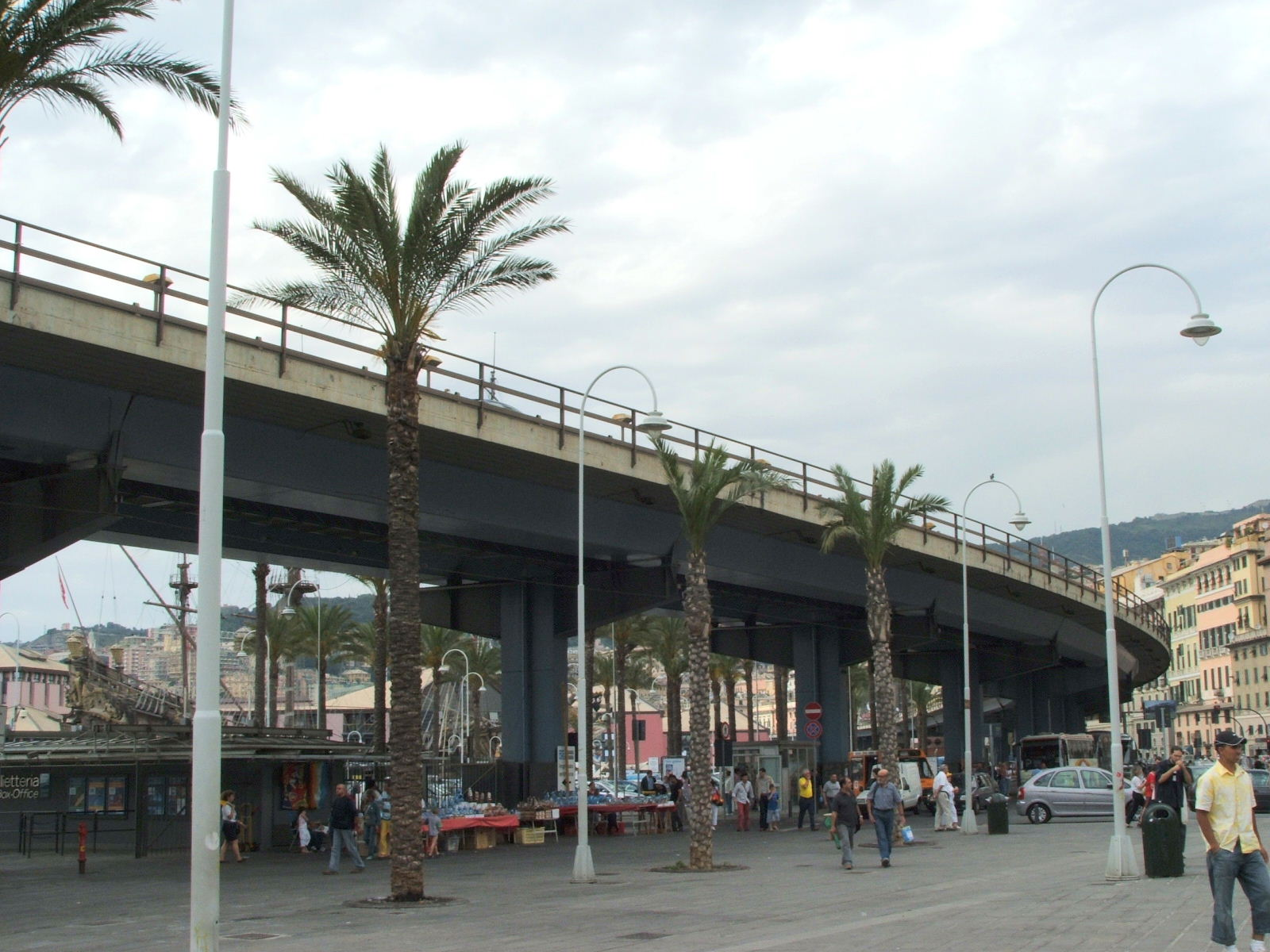 Genova, immagine dal porto antico, piazza Caricamento